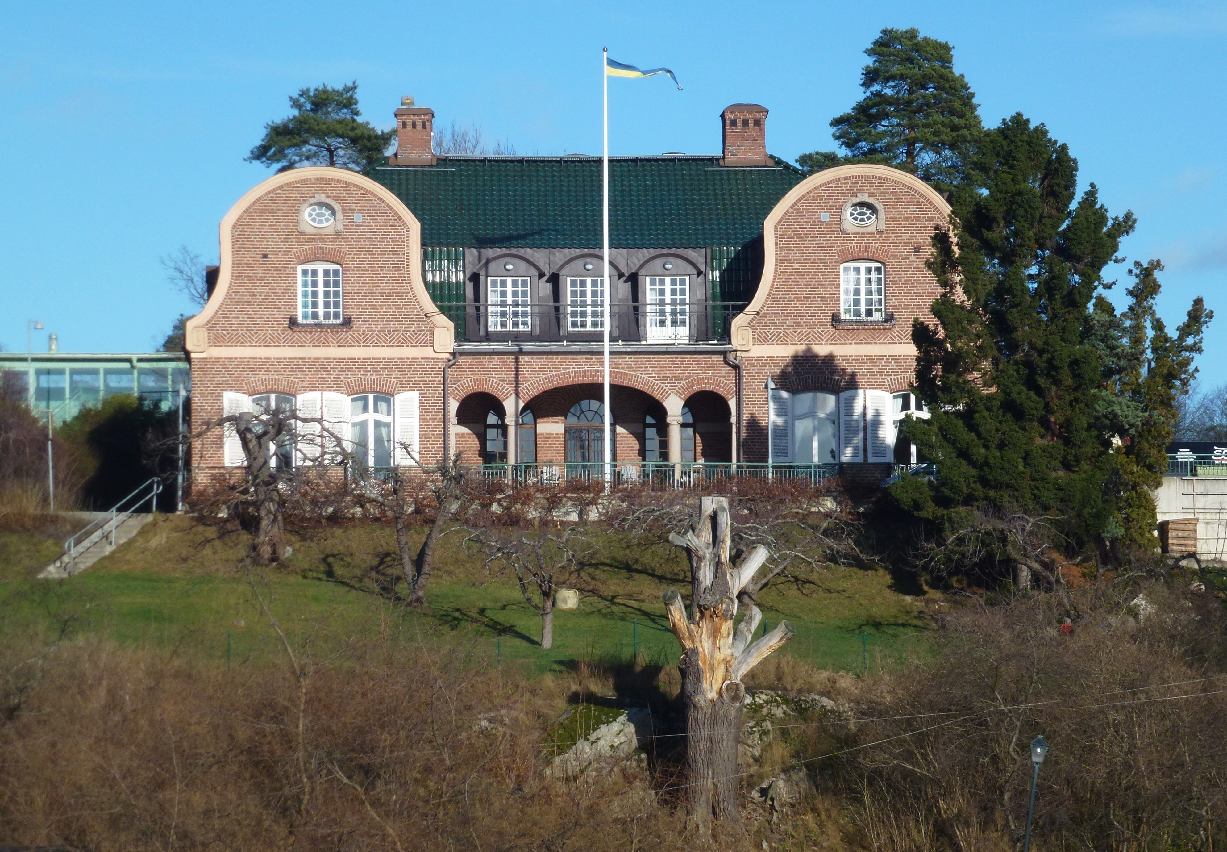 Munterska villan, Carl Munters villa i Stocksund ritades av Thor Thorén 1915.